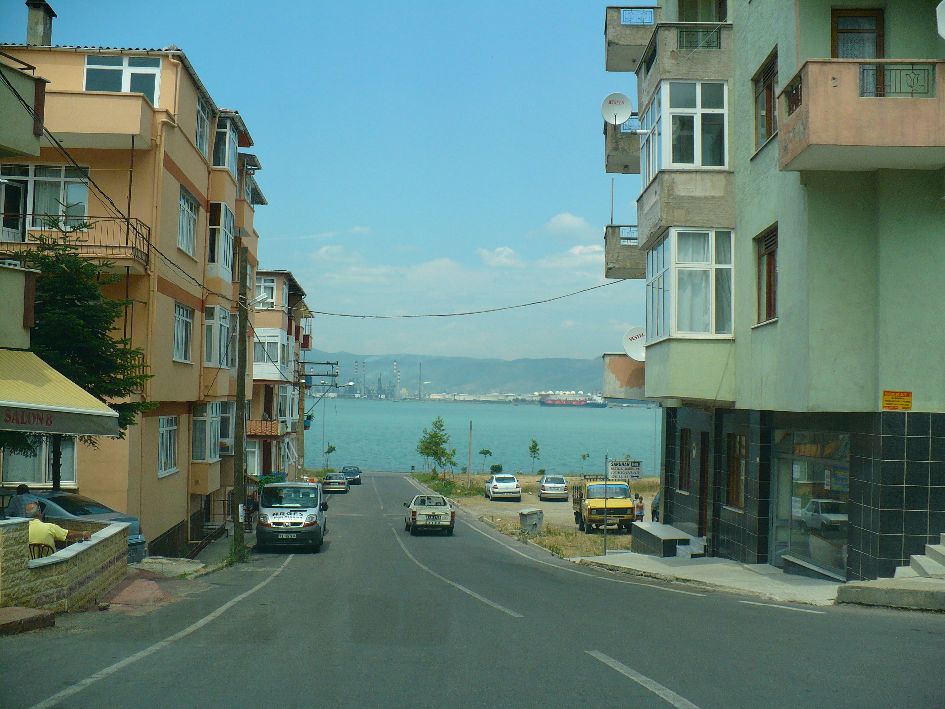 Gölcük'den görüntüler